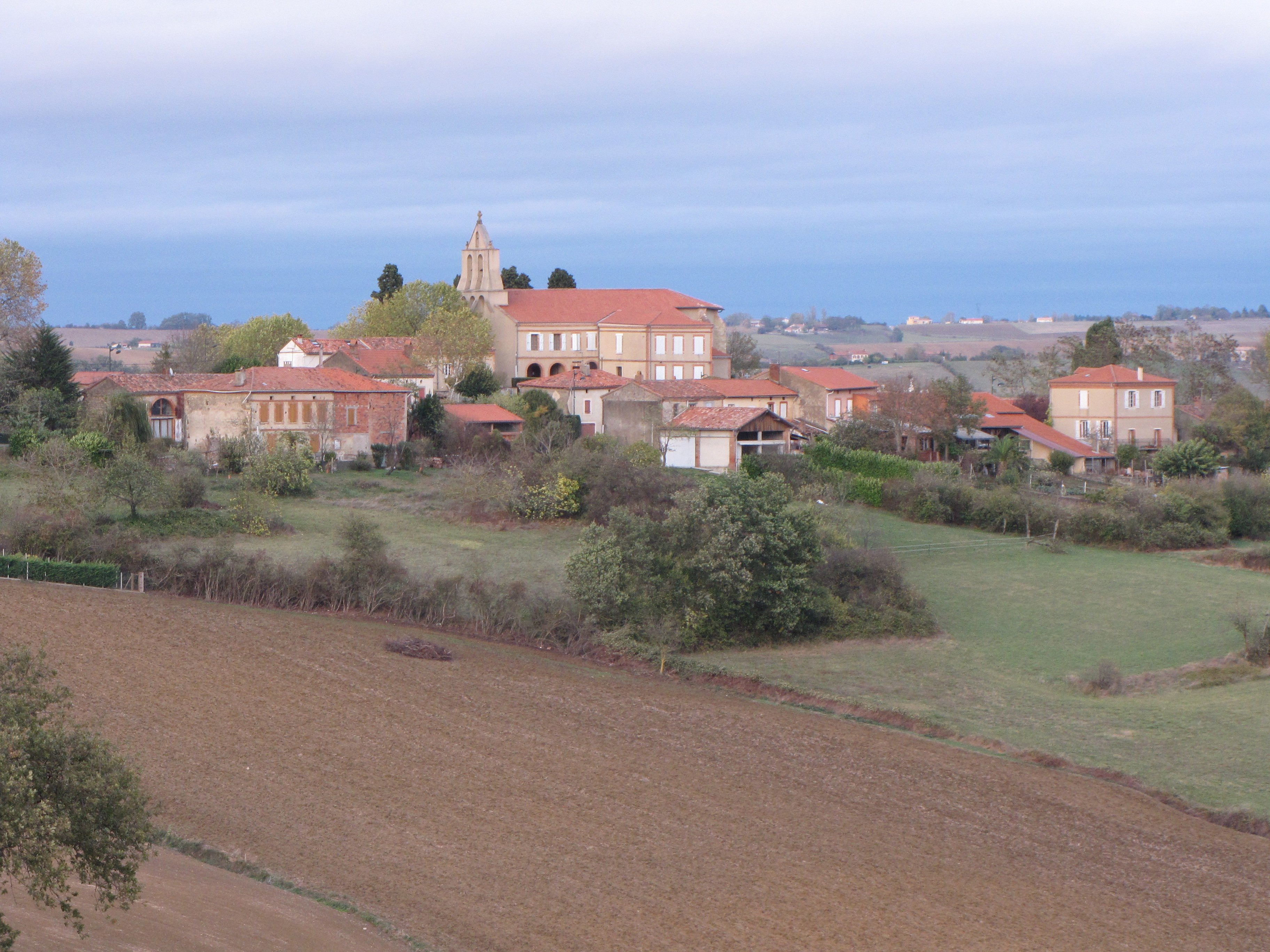 Castagnac